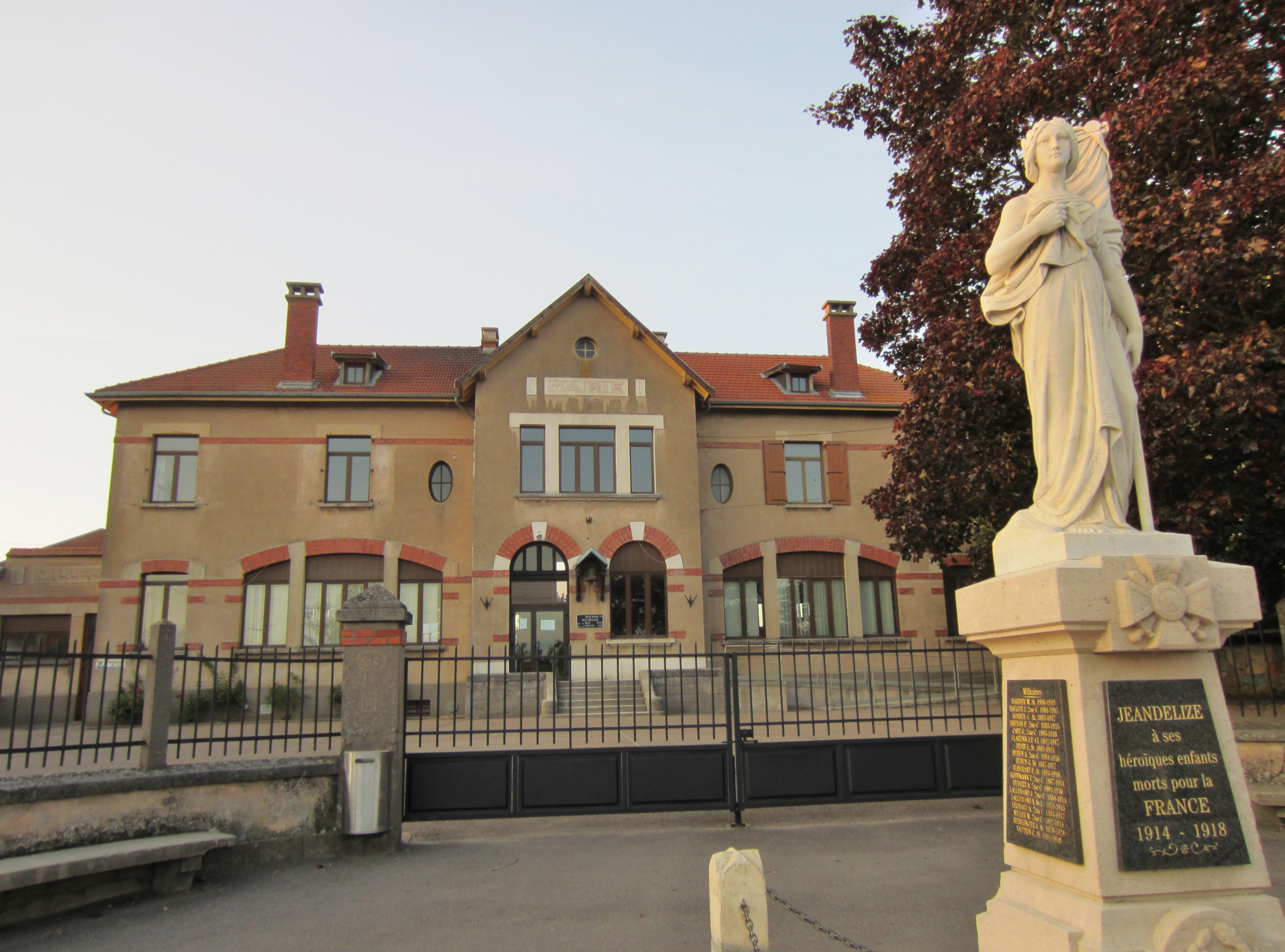 Description mairie Jeandelize mairie Jeandelize